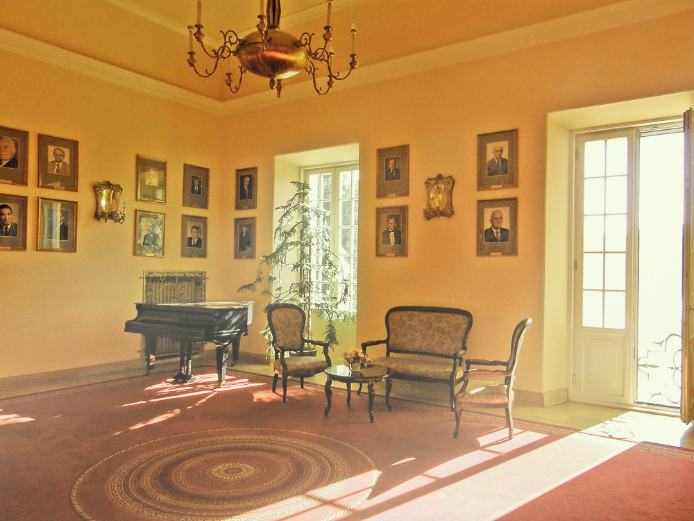 Białystok - wnętrza Pałacu Branickich (zabytek nr A-252)